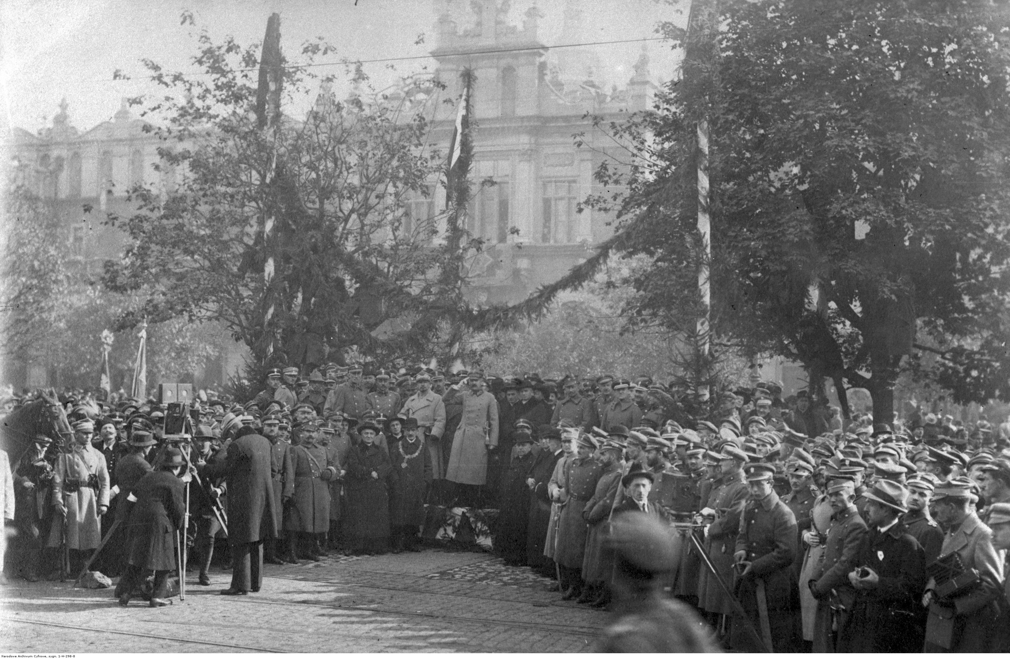 Święto Zjednoczenia Armii Polskiej. Józef Piłsudski (w jasnym płaszczu), generał Józef Haller (po lewej stronie Józefa Piłsudskiego), biskup Władysław Bandurski, rektor Uniwersytetu Jagiellońskiego profesor Stanisław Estreicher podczas defilady wojskowej na Rynku Głównym w Krakowie. Koncern Ilustrowany Kurier Codzienny - Archiwum Ilustracji. Sygnatura: 1-H-298-8